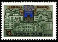 Почтовая марка СССР - 350 лет Тамбову, ЦФА 5721.